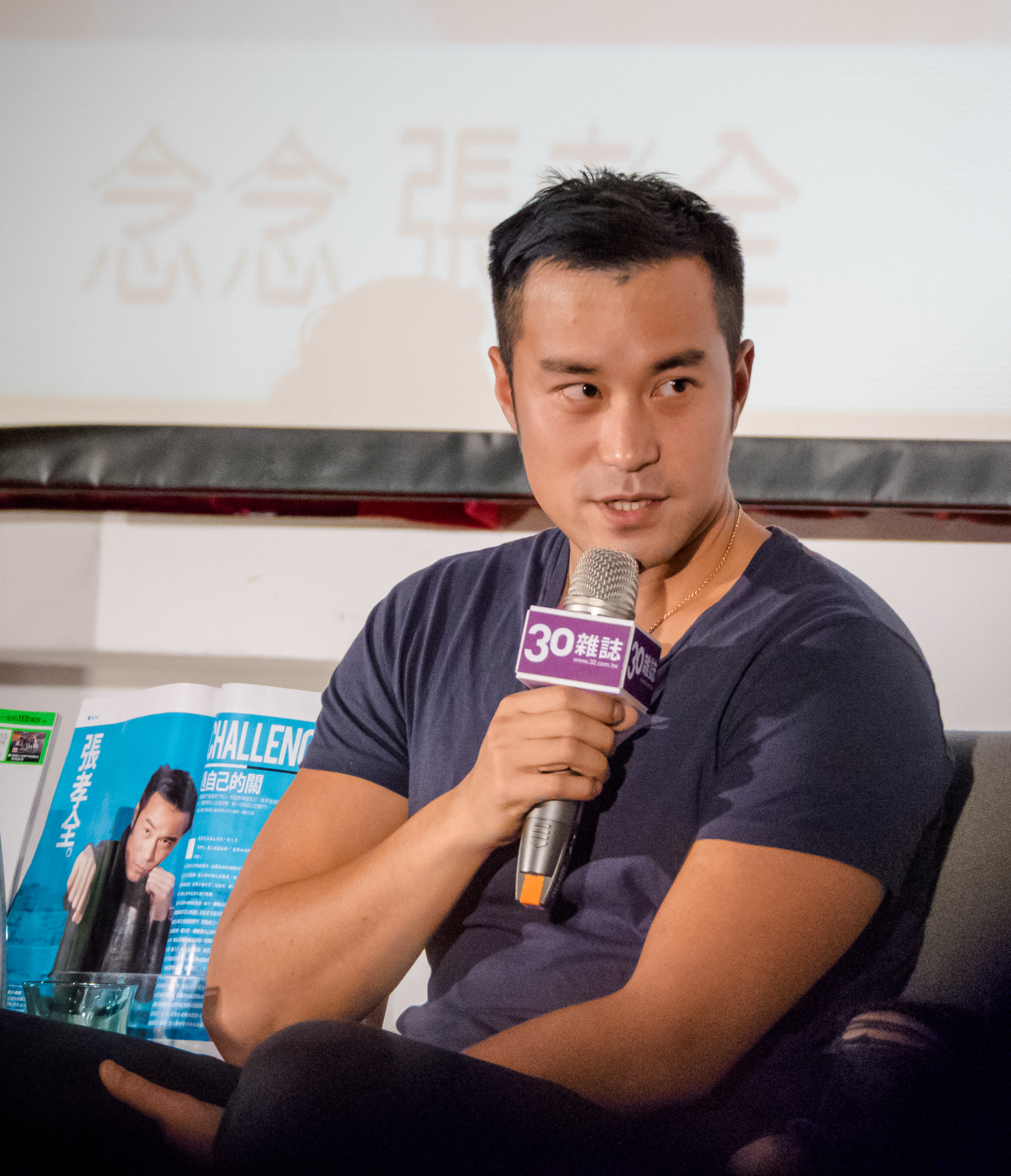 臺灣演員張孝全出席電影《念念》宣傳座談會。